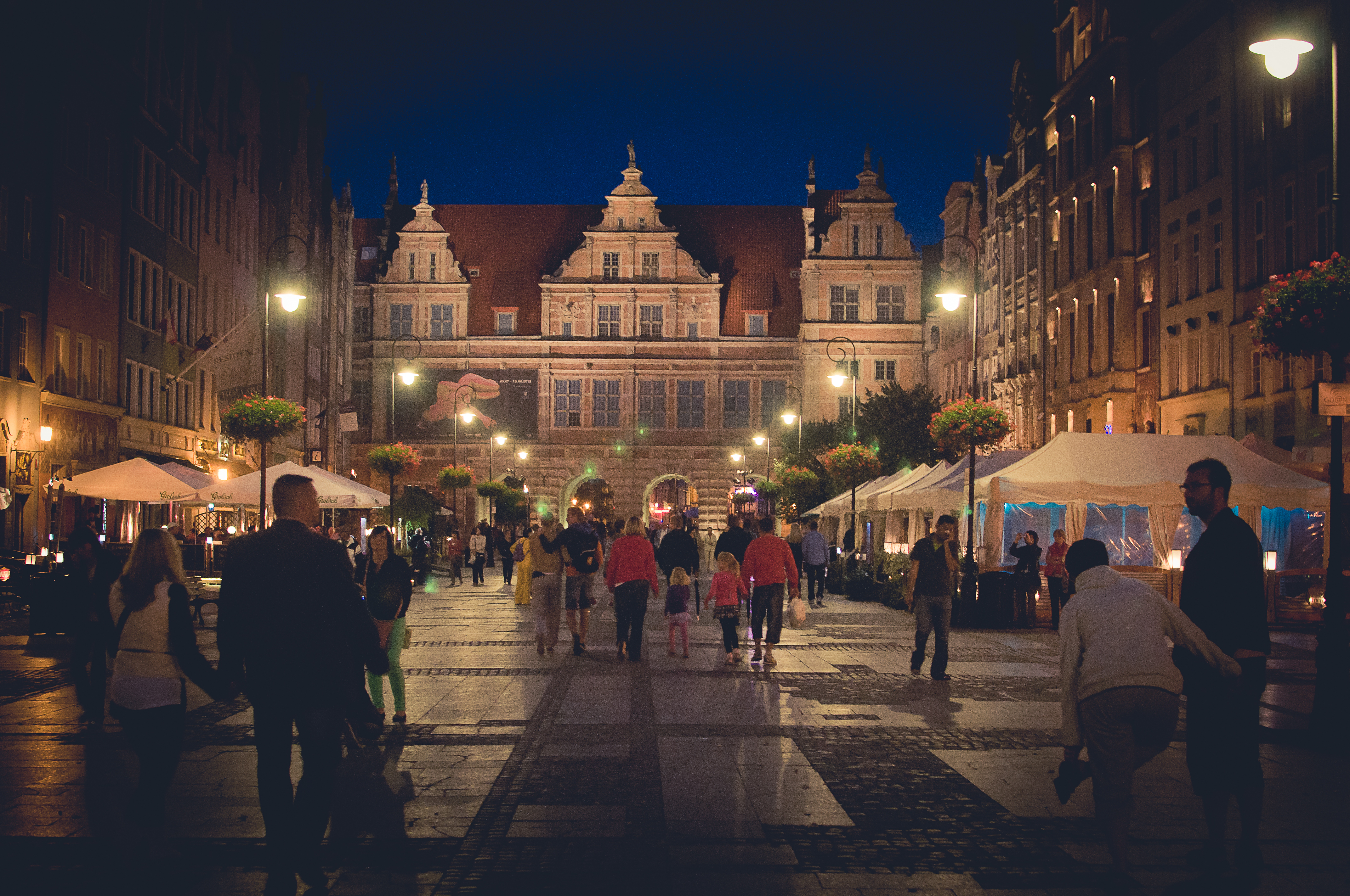 Gdańsk Główne Miasto - Brama Zielona